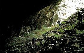 Dolina da crollo in Castel Morrone